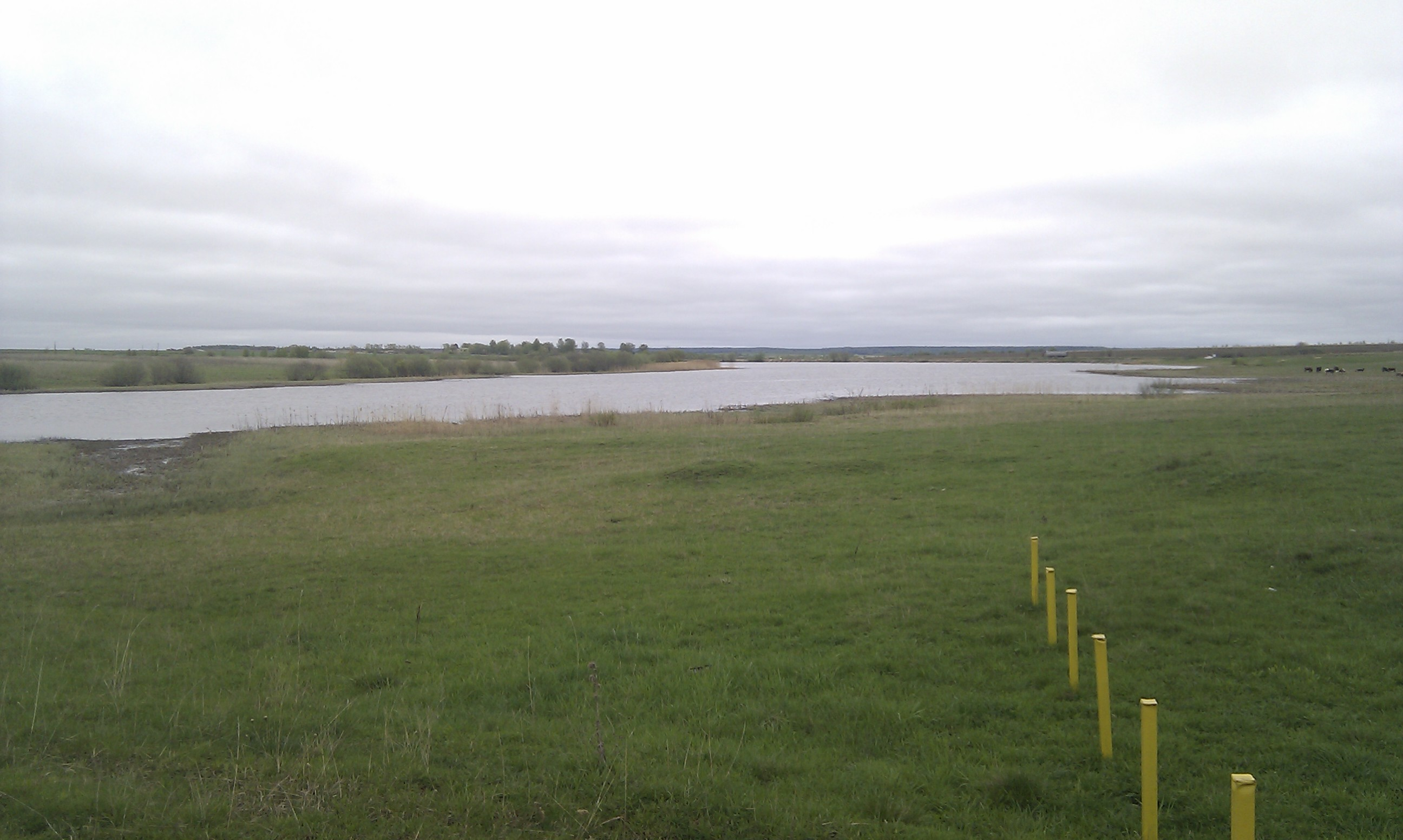 Это глубокая русловая запруда на реке Куница вблизи села Андреевское, Алексанровского района, Владимирской области, Российской Федерации